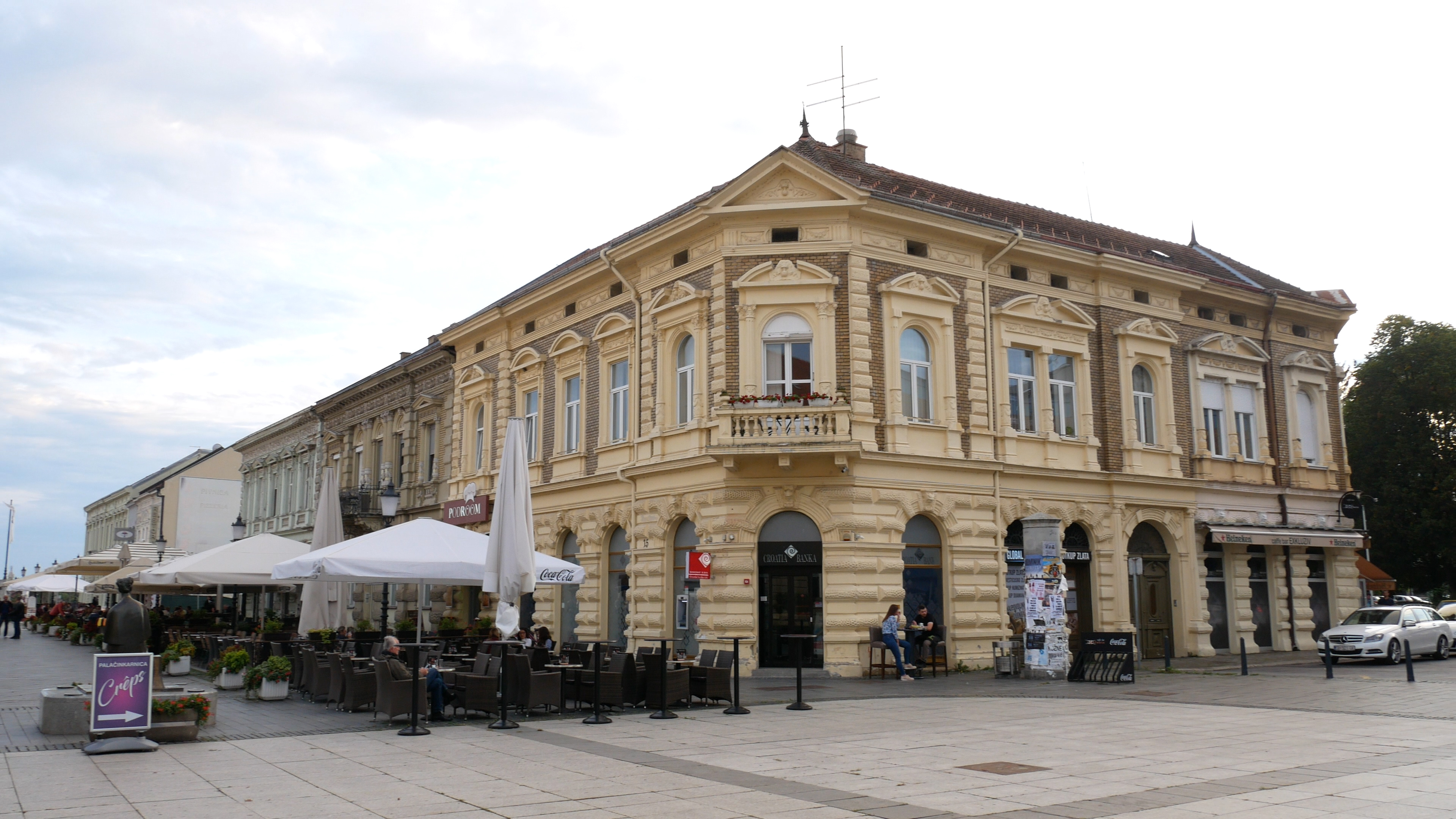 Palače na Korzu, Slavonski Brod